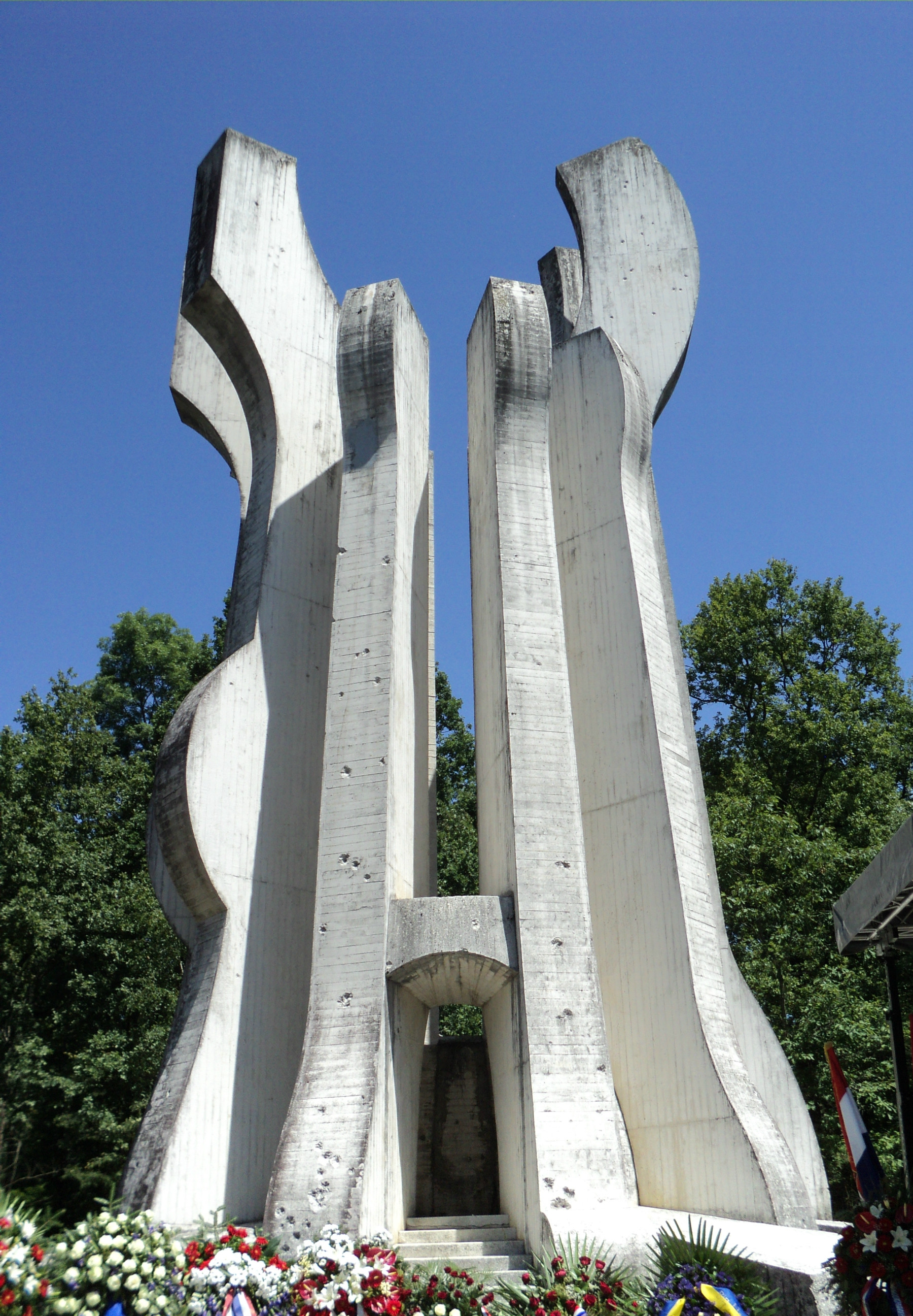 Spomenik na mjestu osnutka Sisačkog partizanskog odredu u šumi Brezovici kod Siska; izgrađen 1981., autor: Želimir Janeš